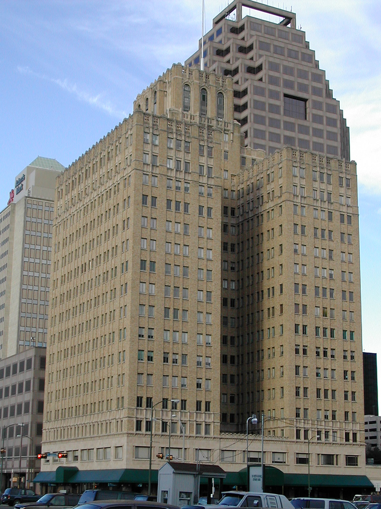 San Antonio Building